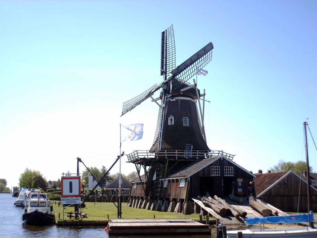 De Jager, molen in Woudsend